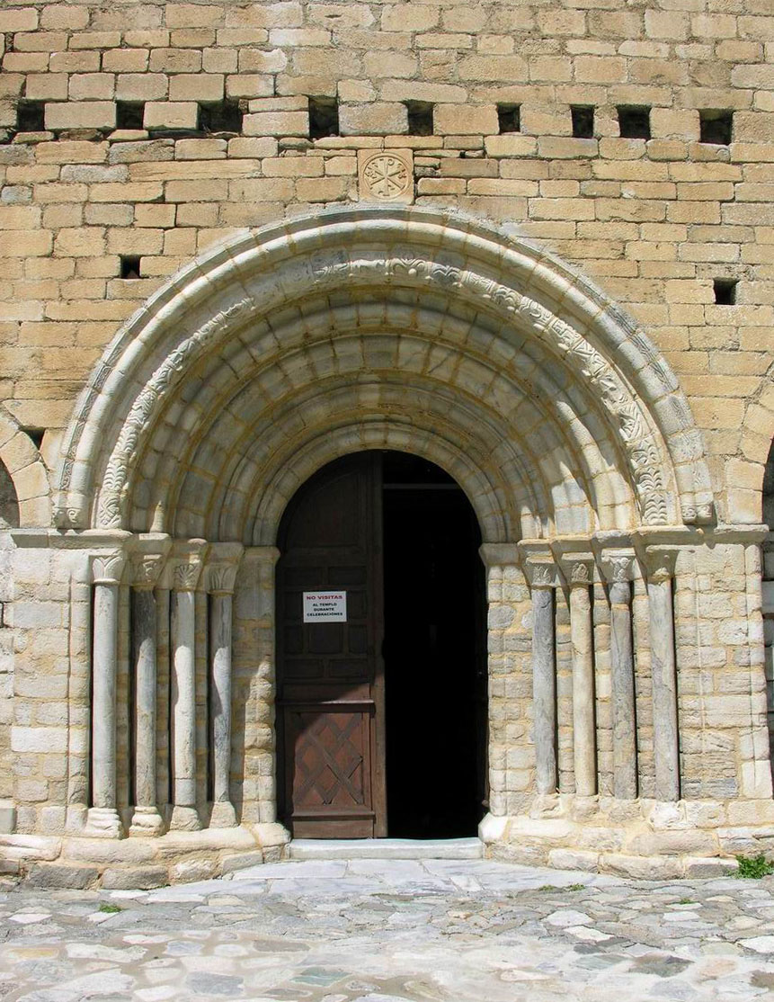 Porta oberta a la façana de migdia